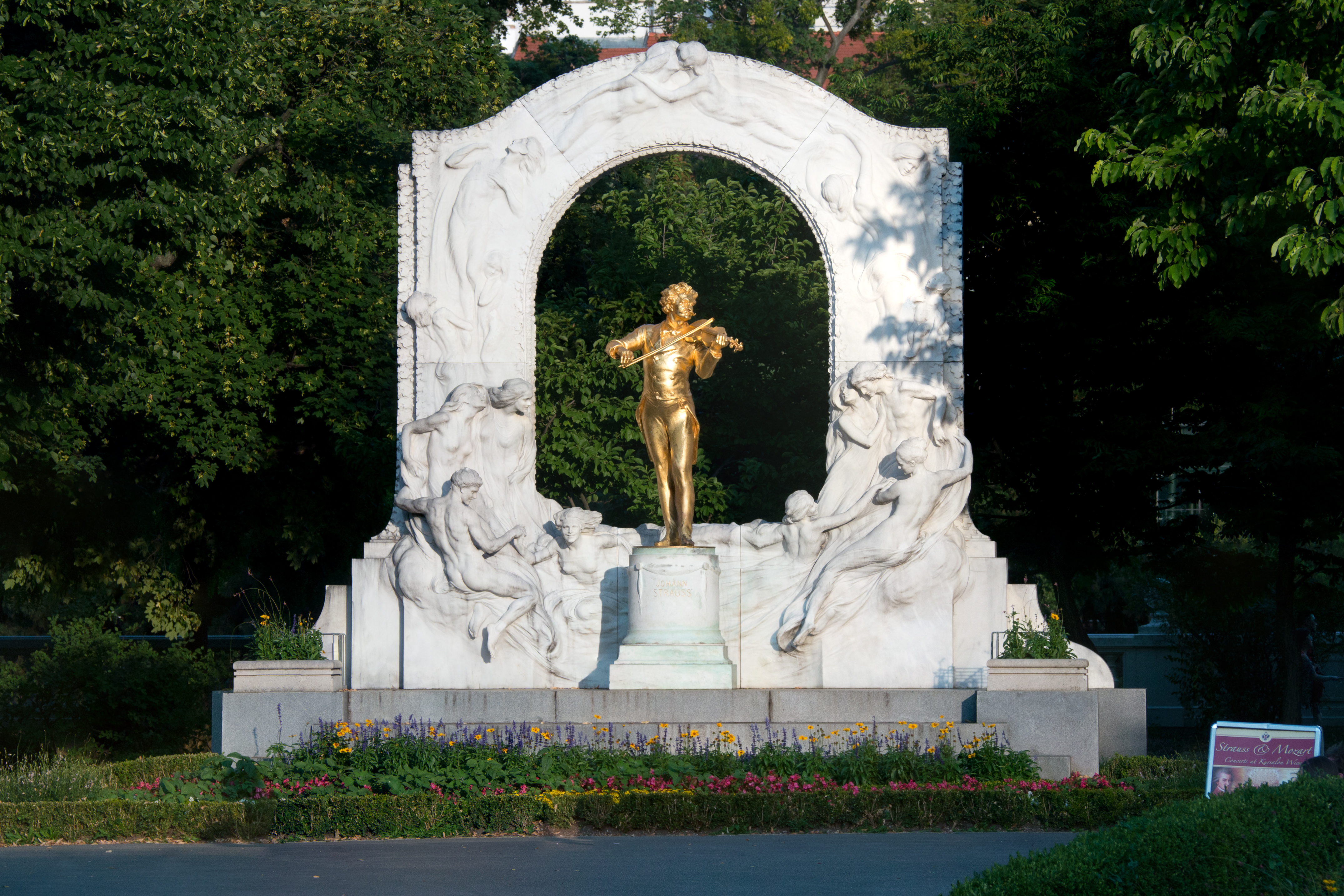 Stadtpark und Kinderpark samt Baulichkeiten